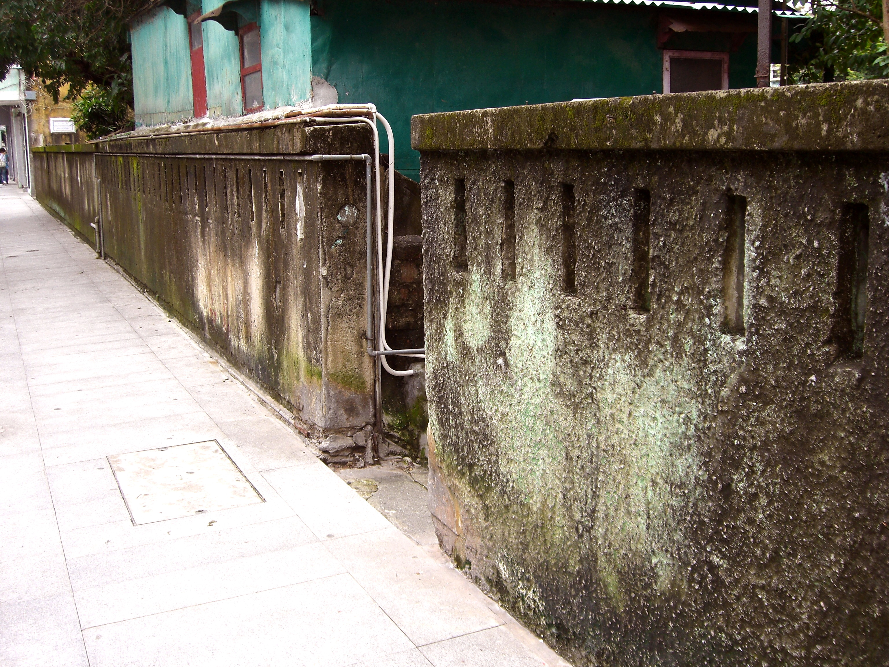 Pátio do Espinho